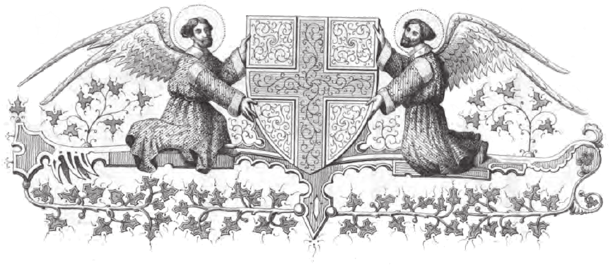 Riproduzione dello stemma di Marsiglia del XIV secolo, autore M.F. Famin.